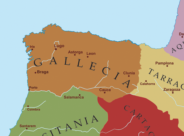 Mapa das provincias romanas do noroeste da peninsula ibérica, a comezos do século V d.C, previamente á chegada dos pobos xermánicos.